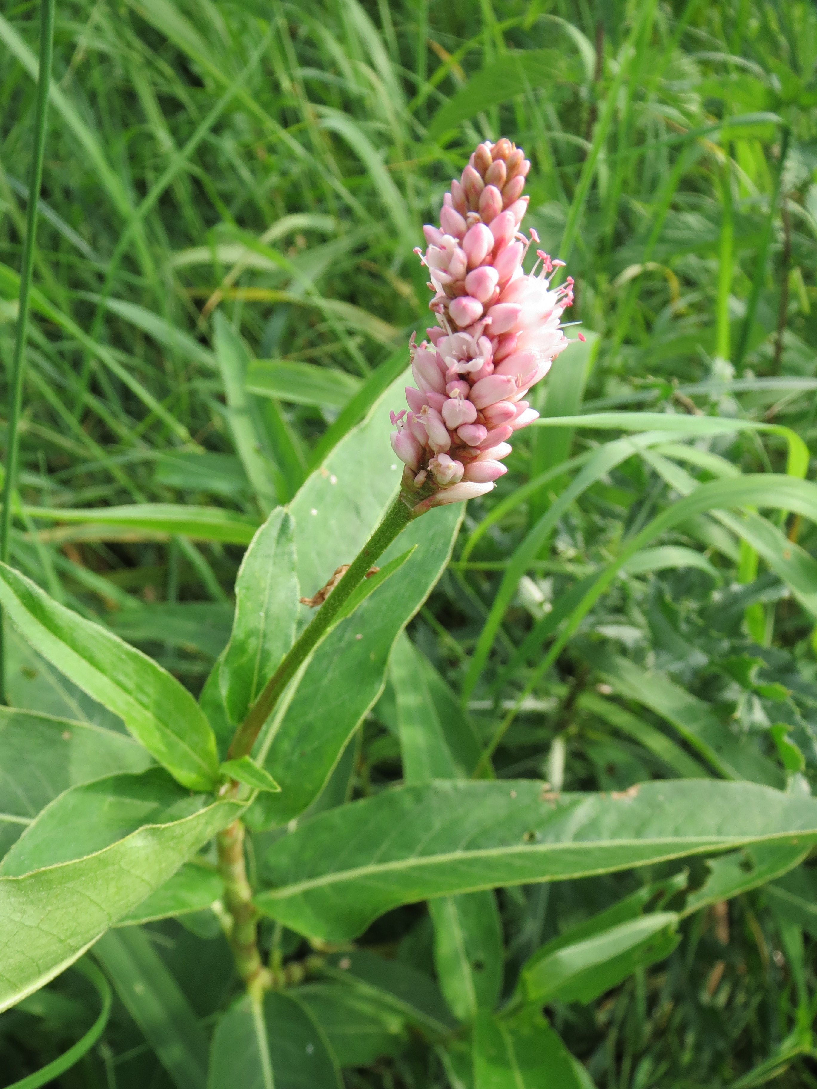 Wasser-Knöterich (Persicaria amphibia) im Hockenheimer Rheinbogen